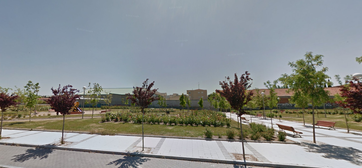 Los viveros